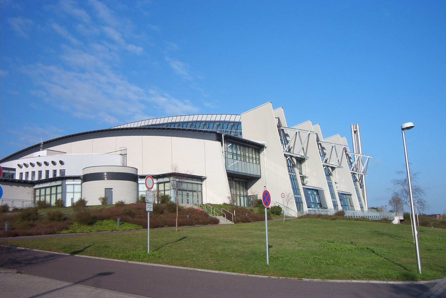 B: Bürdelandhalle in Magdeburg, Südseite Q: selbst aufgenommen D: 11.4.2005 L: GNU-FDL